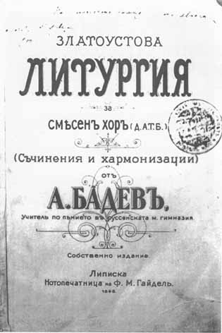 Златоустова литургия от композитора Атанас Бадев (Leipzig 1898)